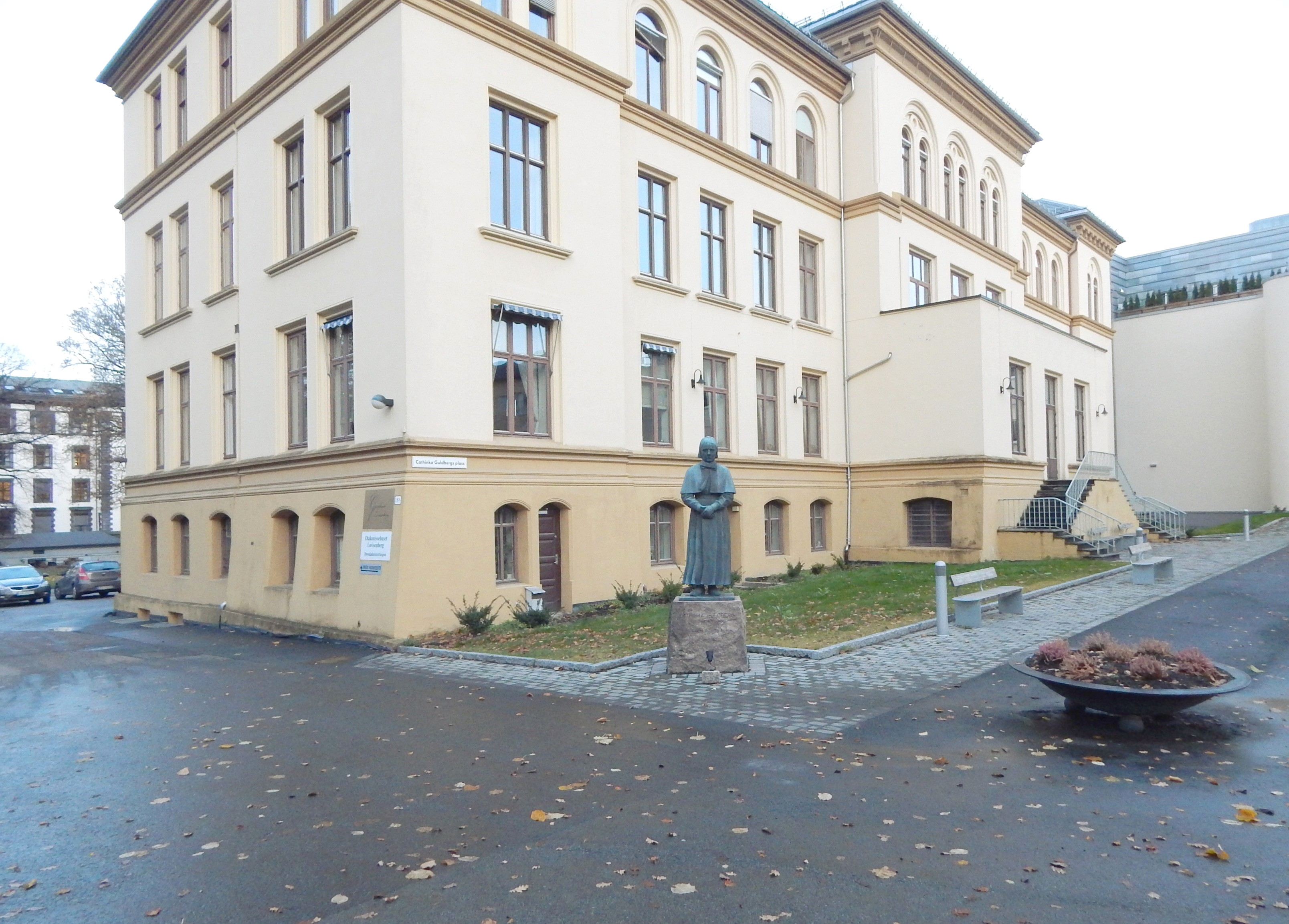 Cathinka Guldbergs plass